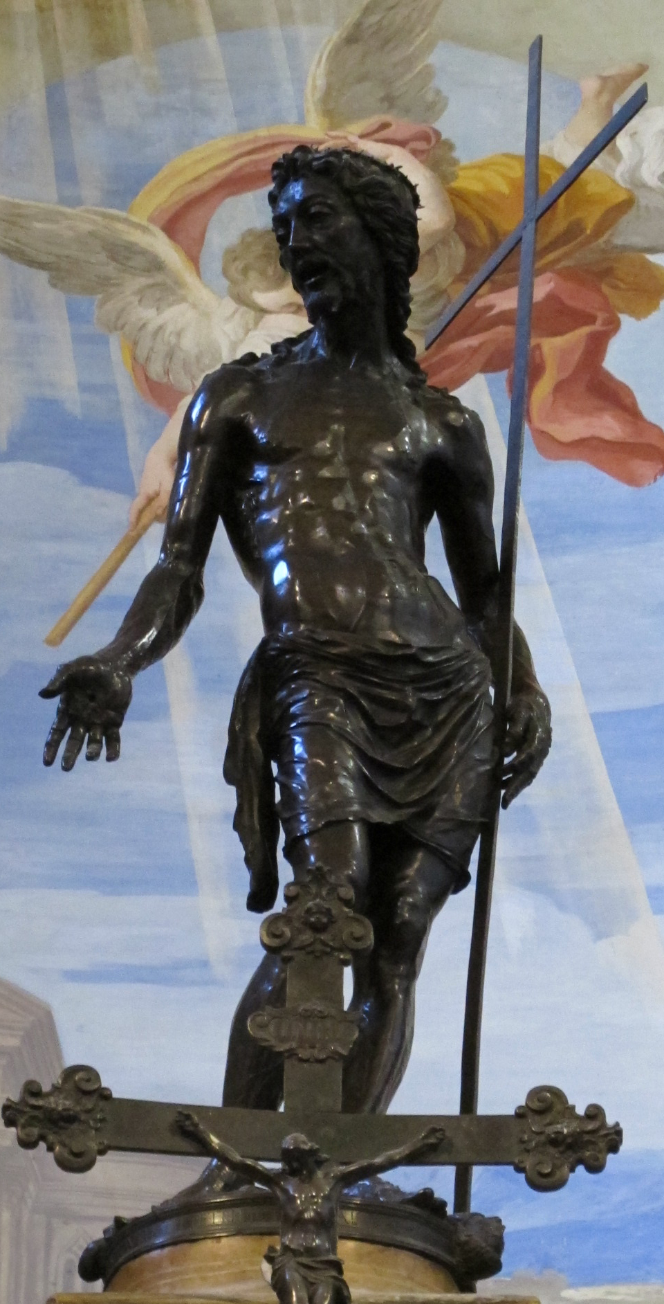 Santissima Annunziata (Siena) 04 san giovanni del vecchietta, 1476 (2)